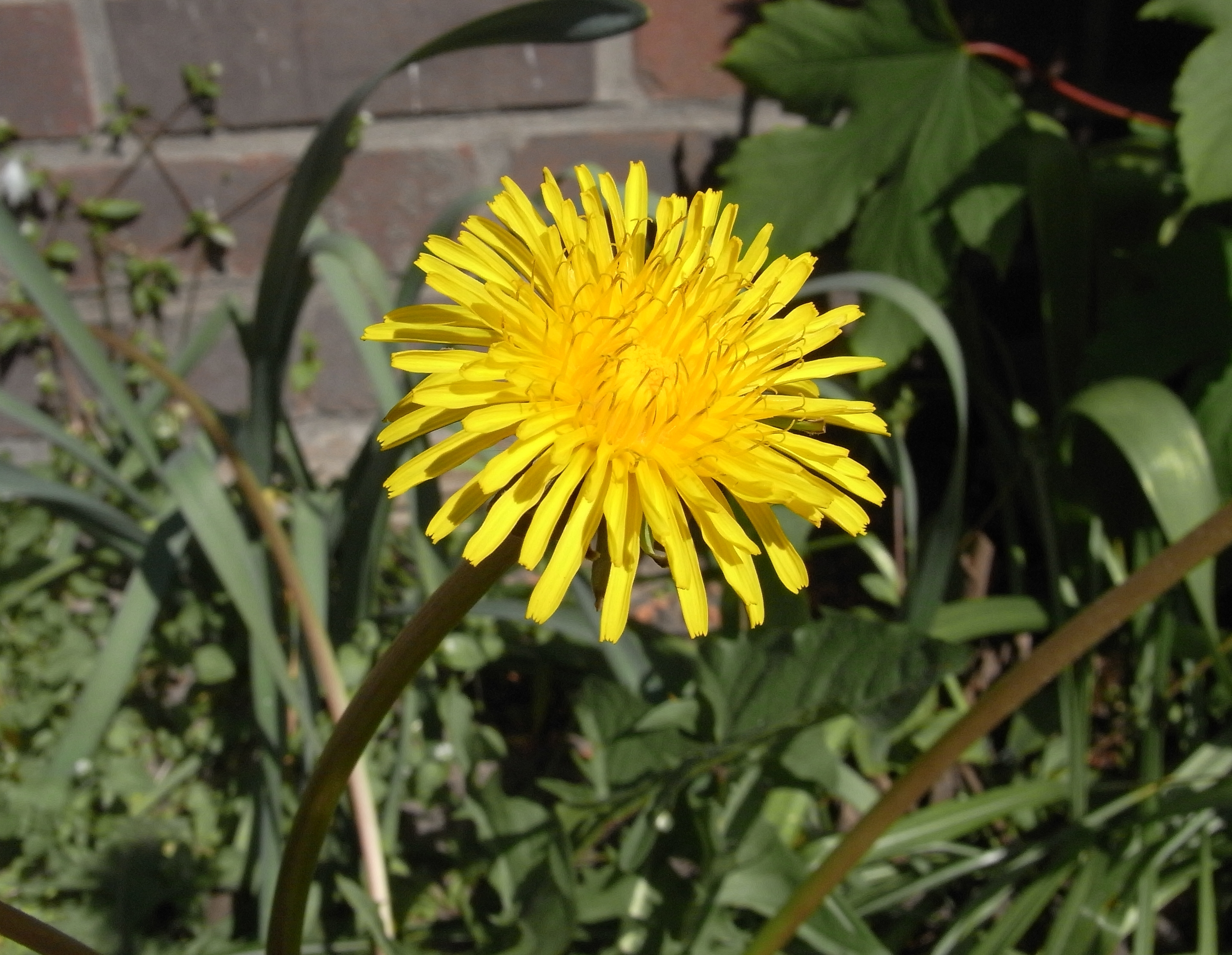 Löwenzahn